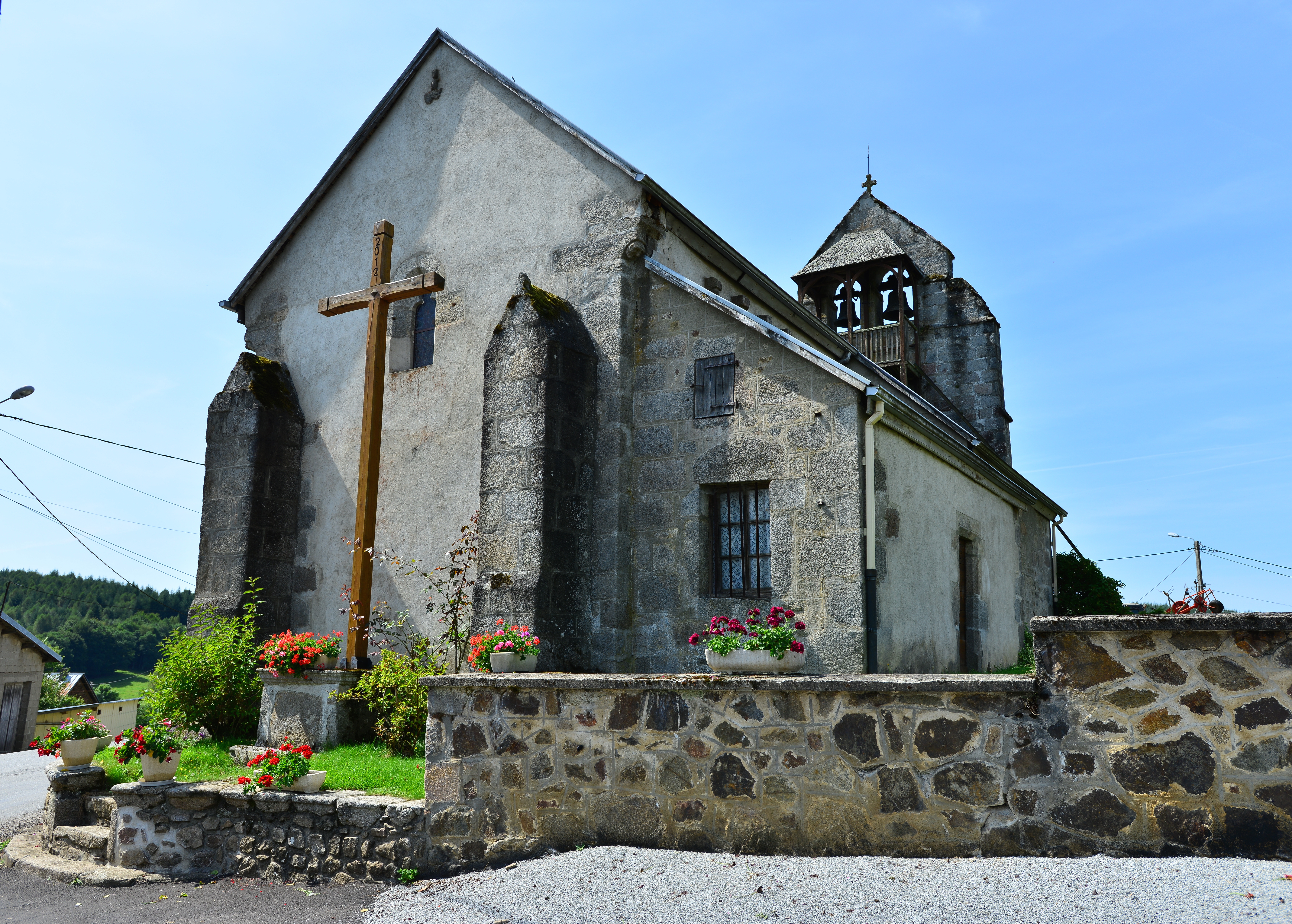 Couffy sur Sarsonne, Corrèze, France.